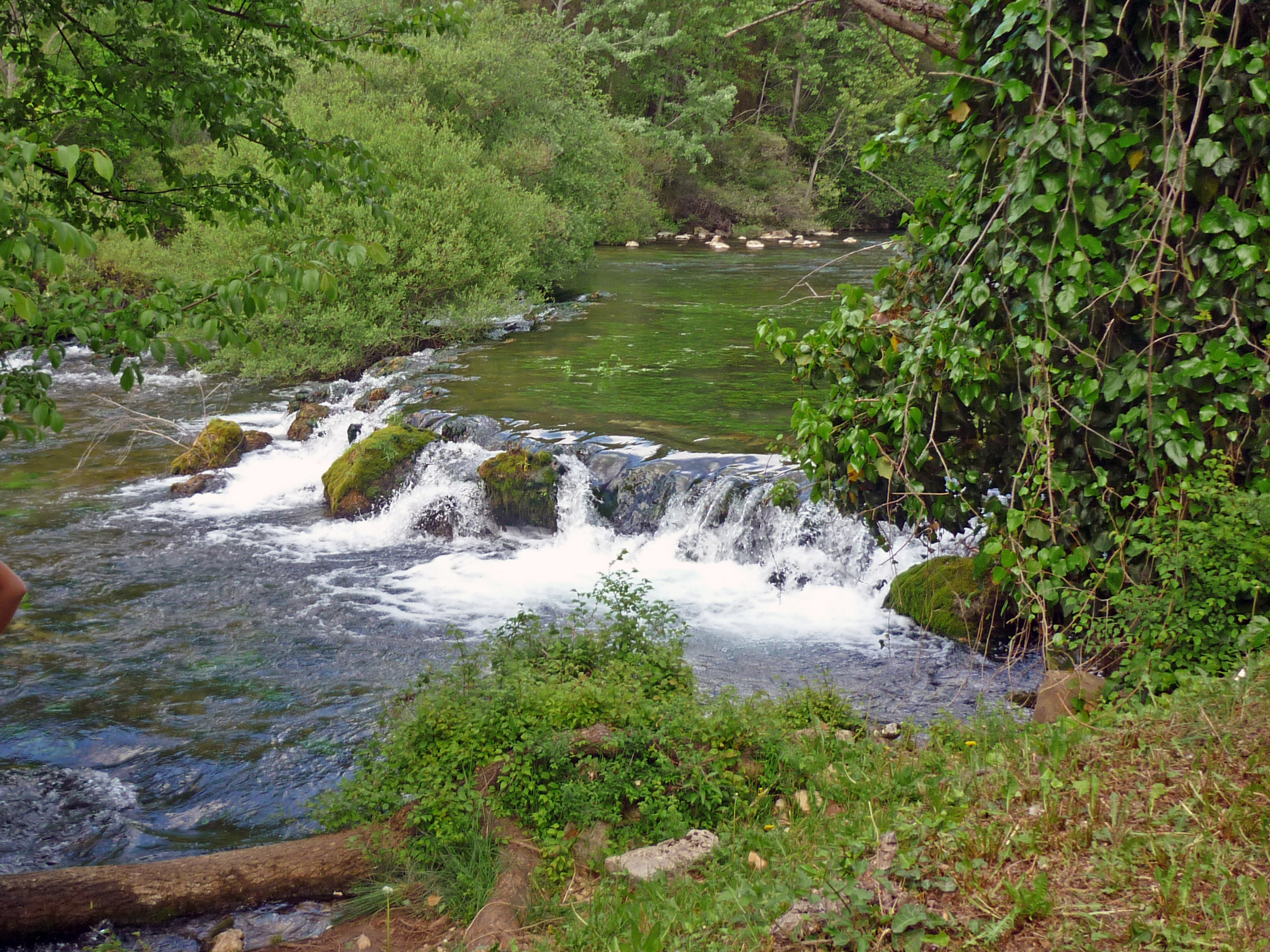 Jadro-Tal bei Solin